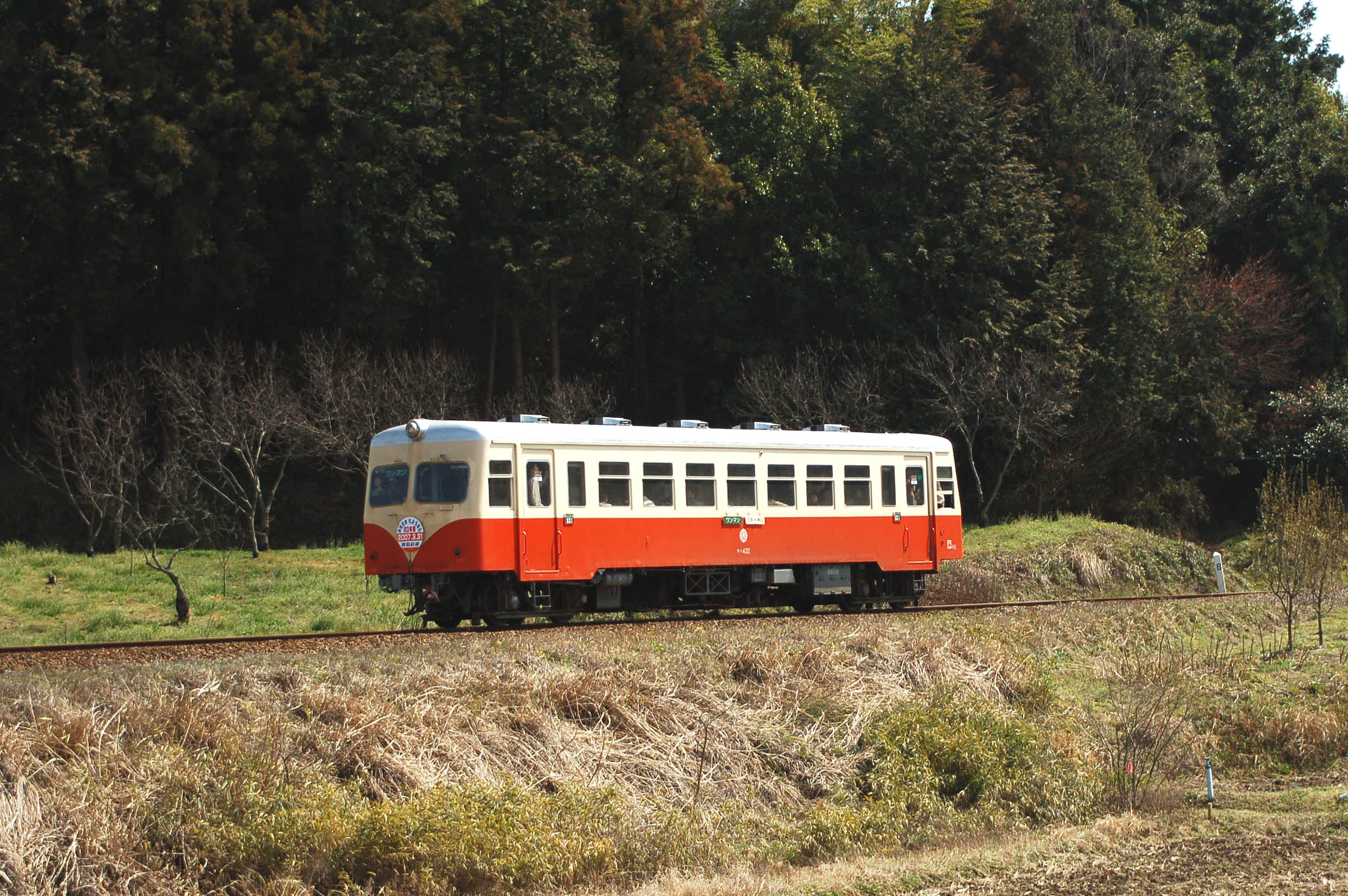 Kashima railway Kiha430 series diesel car, Kiha-432. 鹿島鉄道キハ430形、キハ432。